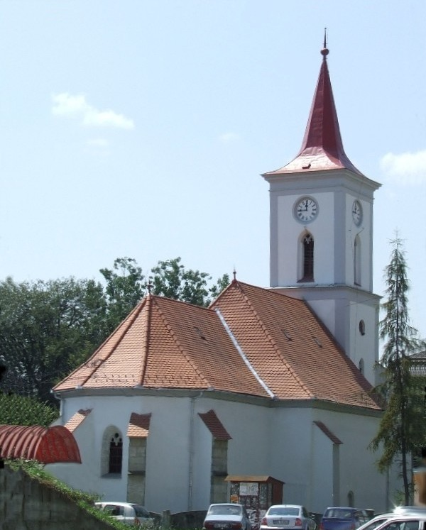 Church in Beclean, Bistriţa-Năsăud County, Romania